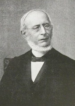 Henri Weil (1818-1868)